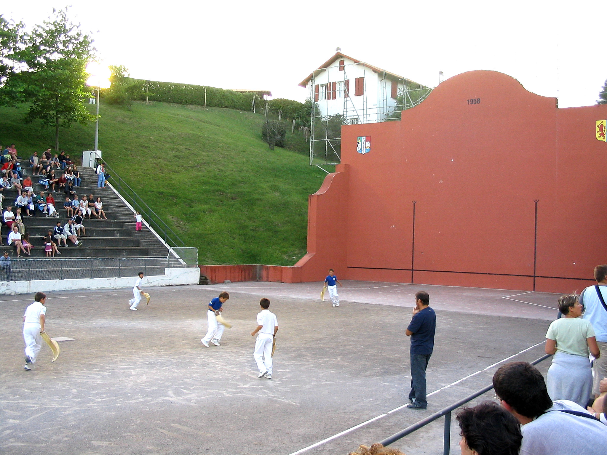 Bidart, partie de Chistéra. Photo prise le 28/07/04 par Harrieta171